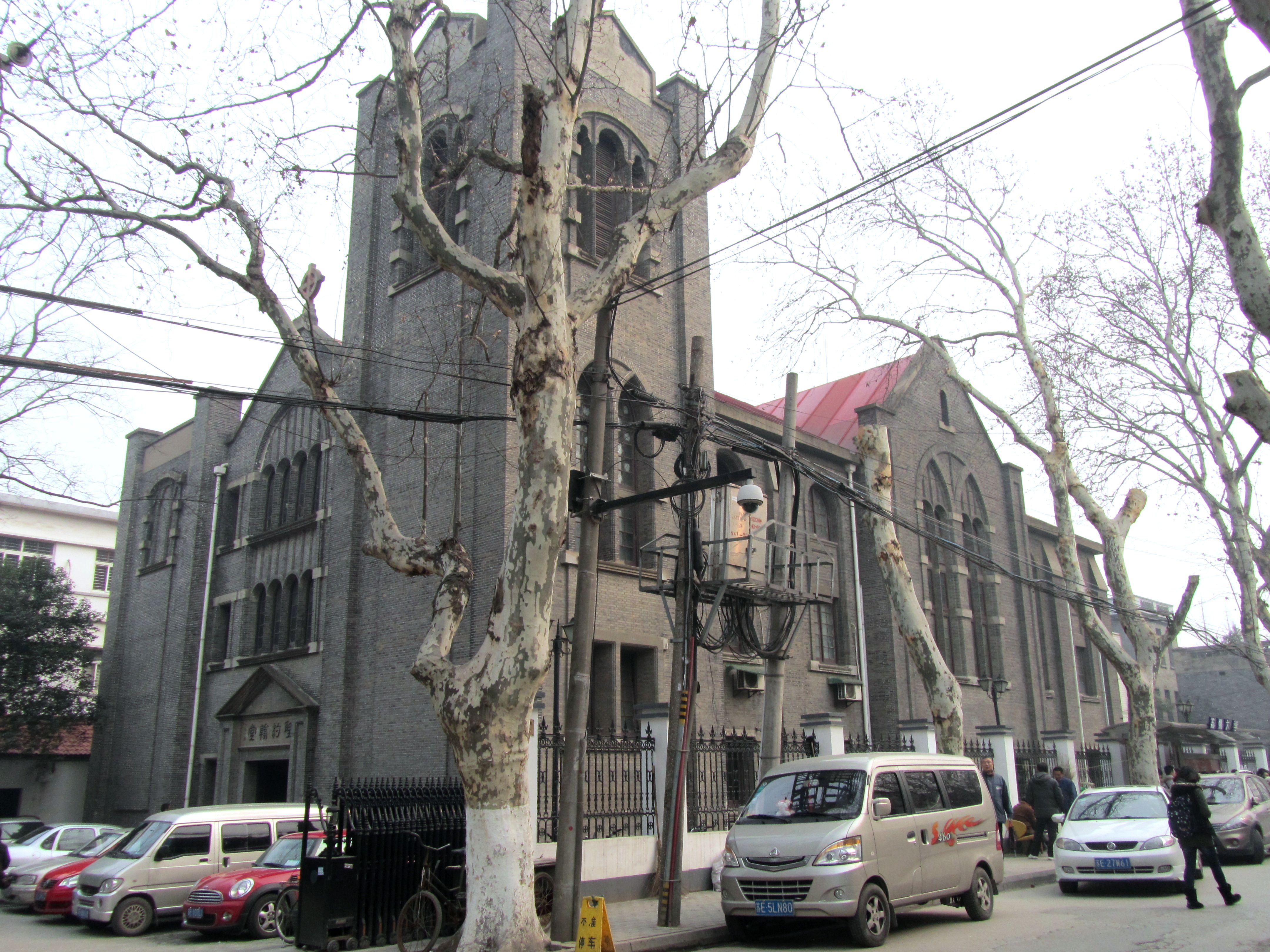 苏州圣约翰堂，自西南侧看。